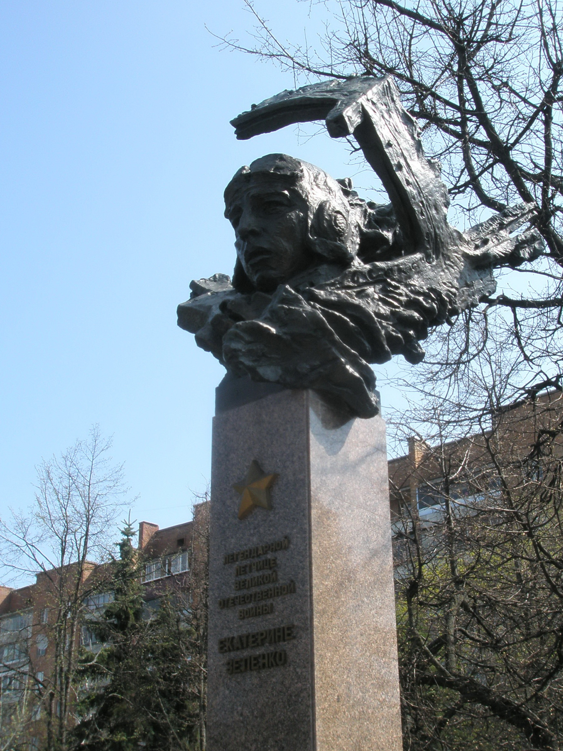 Памятник Екатерине Зеленко в Курске